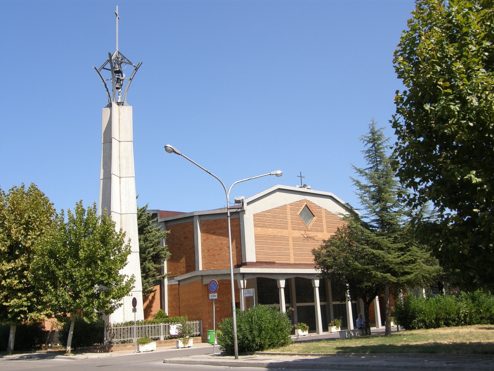 Pescara